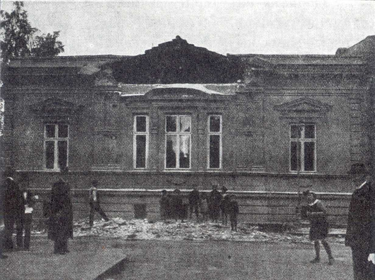 Сградата на Министерския съвет на улица "6-ти септември" в София, пострадала от земетресението през 1917 година